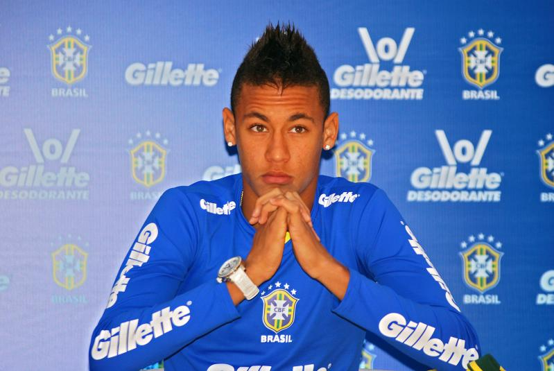 Jogador Neymar em 2010.